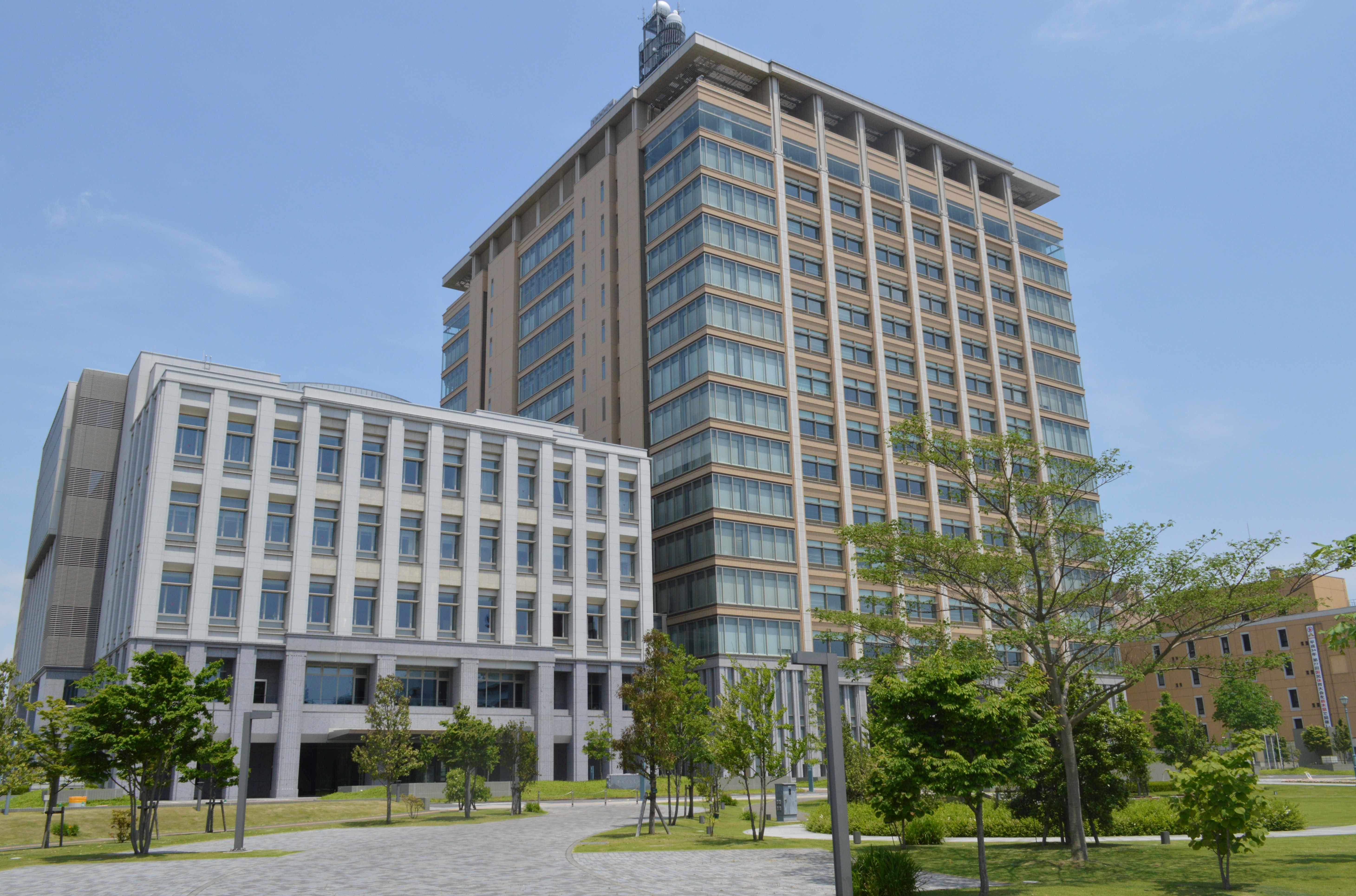 栃木県宇都宮市 栃木県庁舎（右）と栃木県議会議事堂（左）